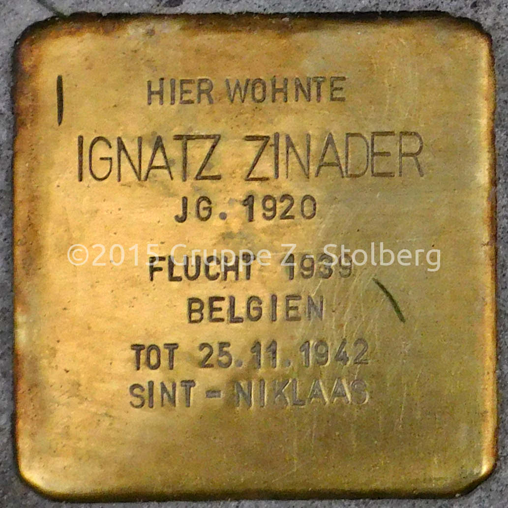 Stolperstein für Ignatz Zinader verlegt am 18. Dezember 2015